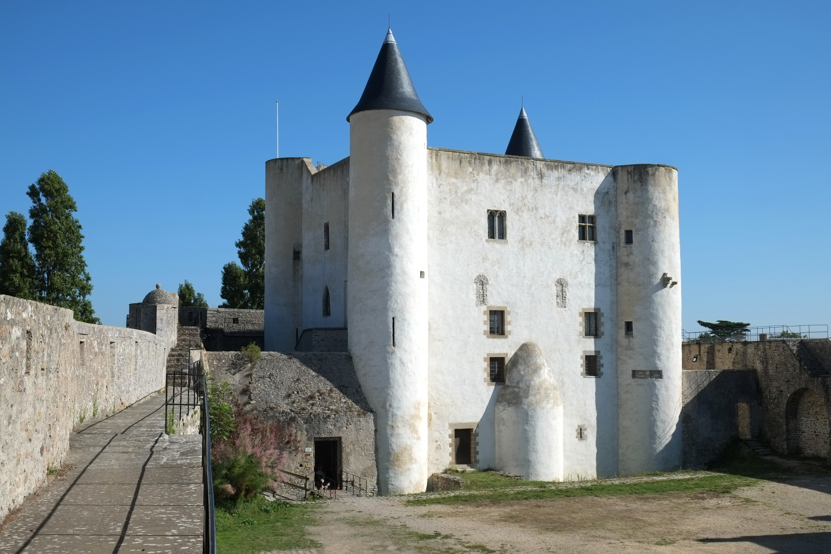 Château de Noirmoutier Vendée France